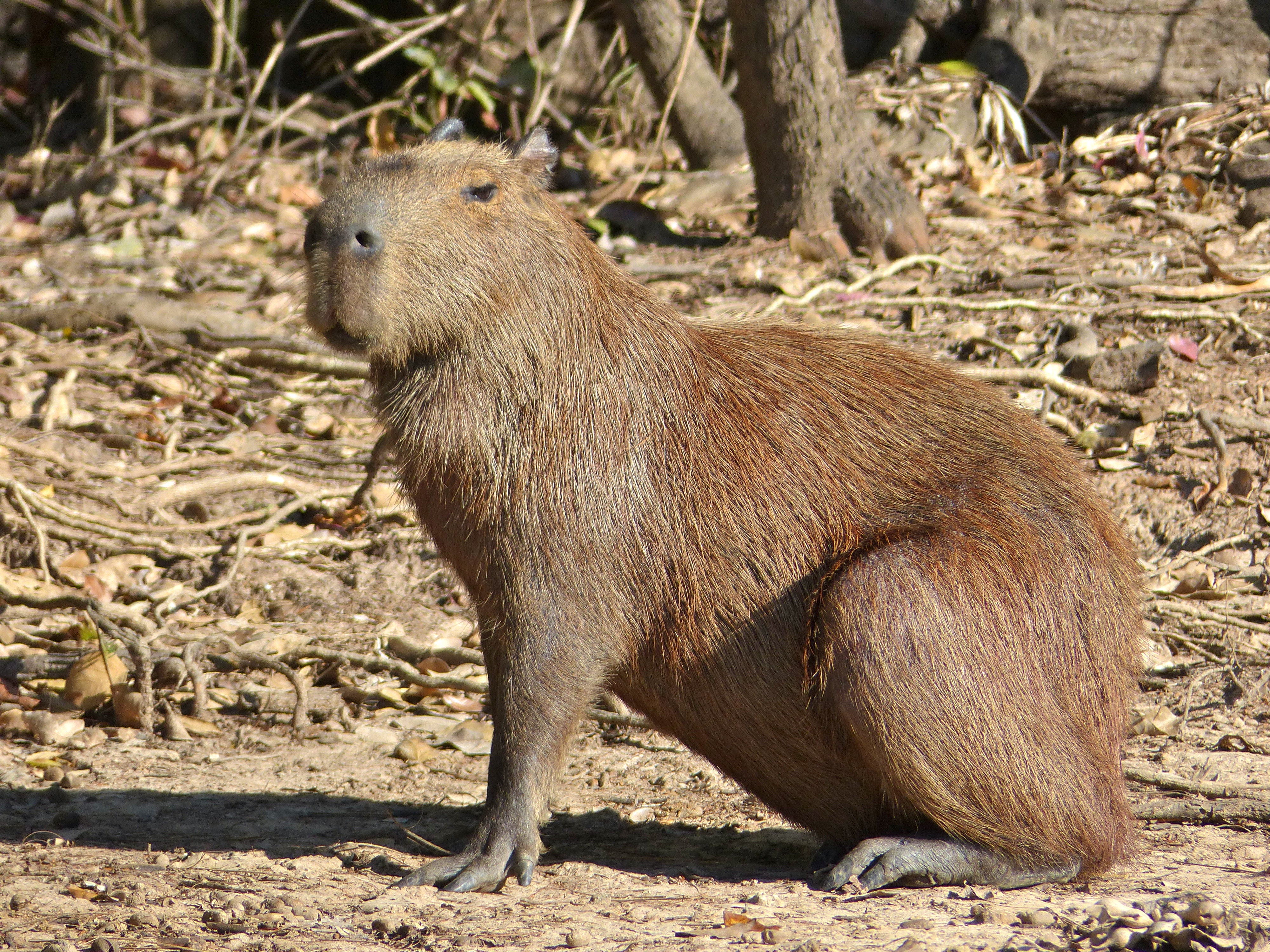 Rio Claro, Transpantaneira, Poconé, Mato Grosso, BRAZIL